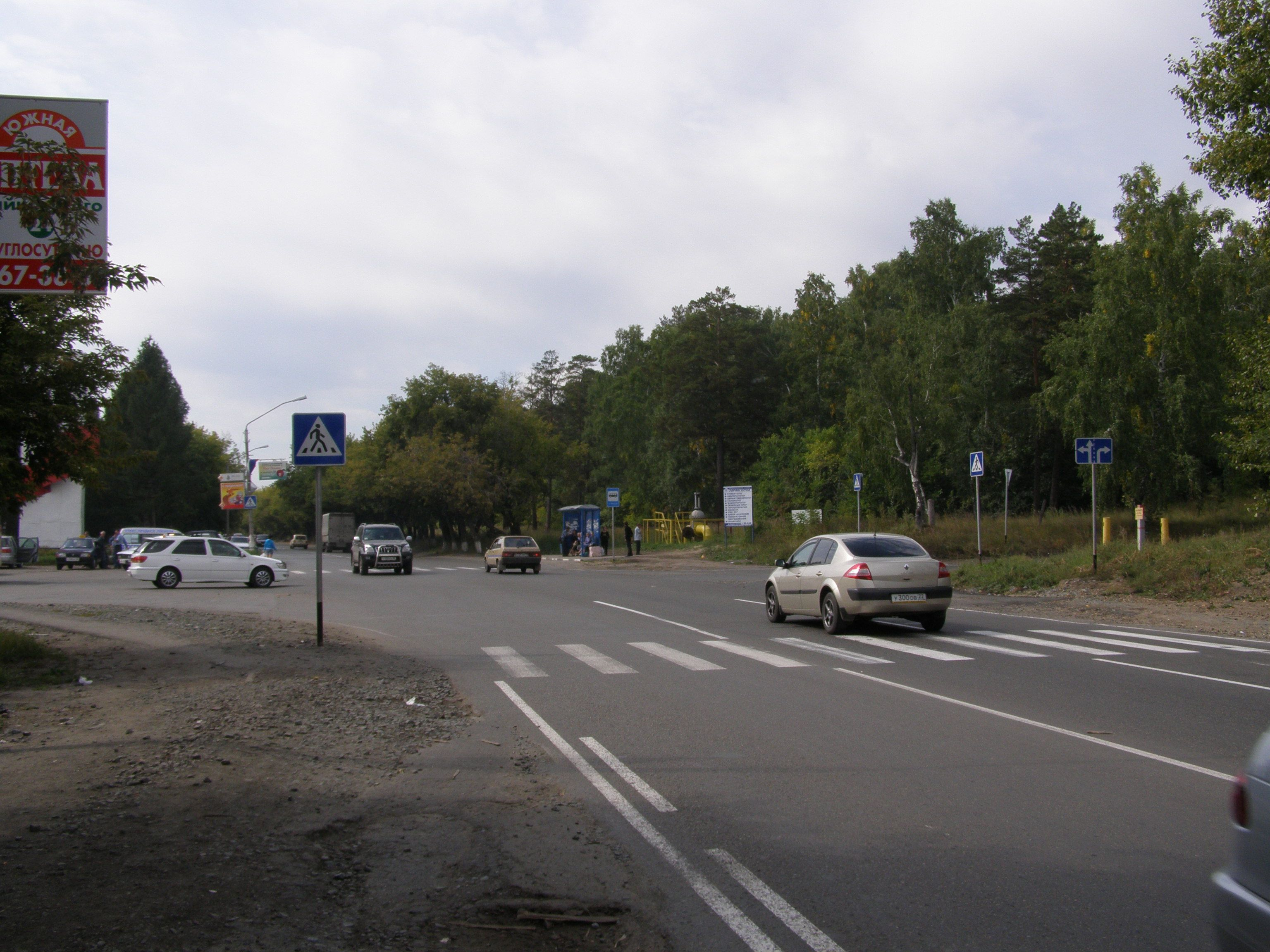 Южный тракт на въезде в п. Южный. Справа - ленточный бор